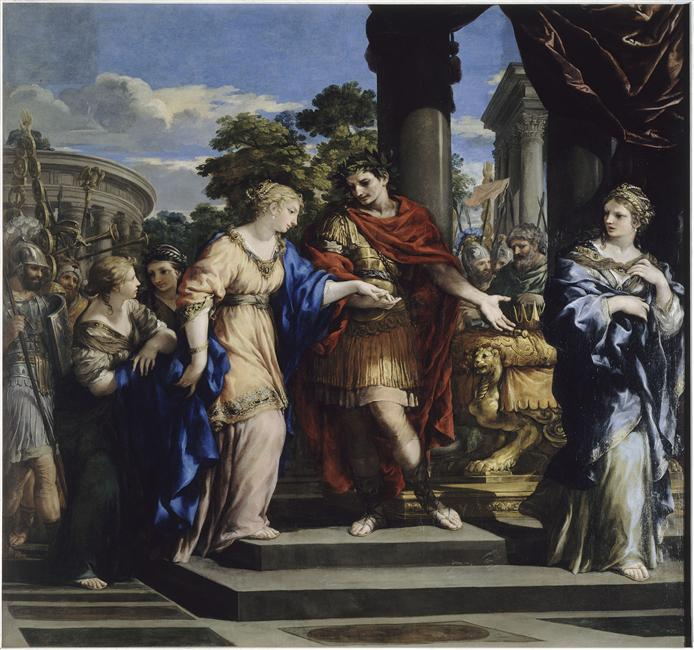 César remet Cléopâtre sur le trône d’Egypte